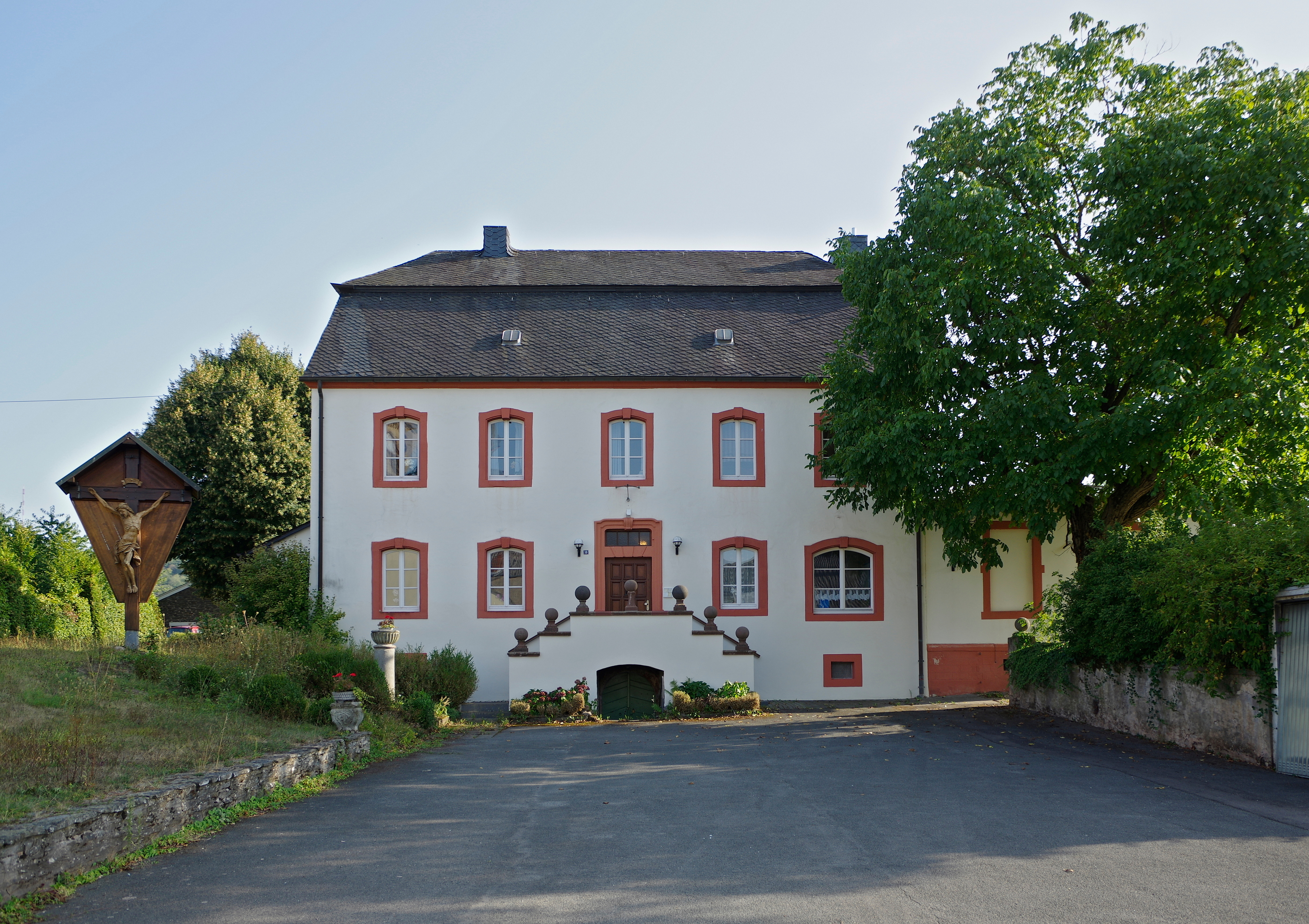 Wiltingen, Saarstraße 10, Pfarrhaus, barocker Mansarddachbau, bezeichnet 1732